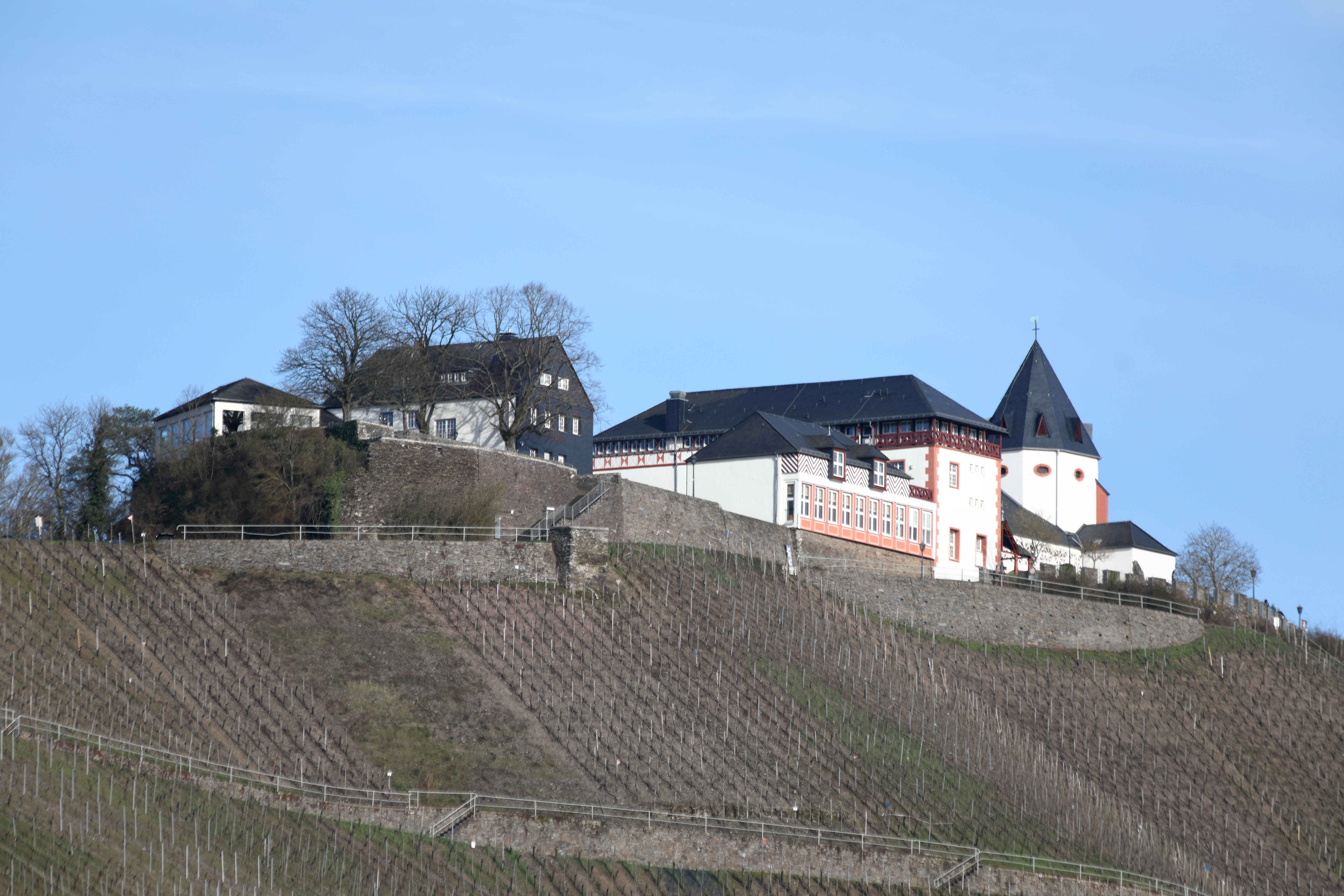 Die Marienburg beherbergt heute eine Jugendbildungsstätte. Hier der Blick vom Moselufer bei Pünderich.